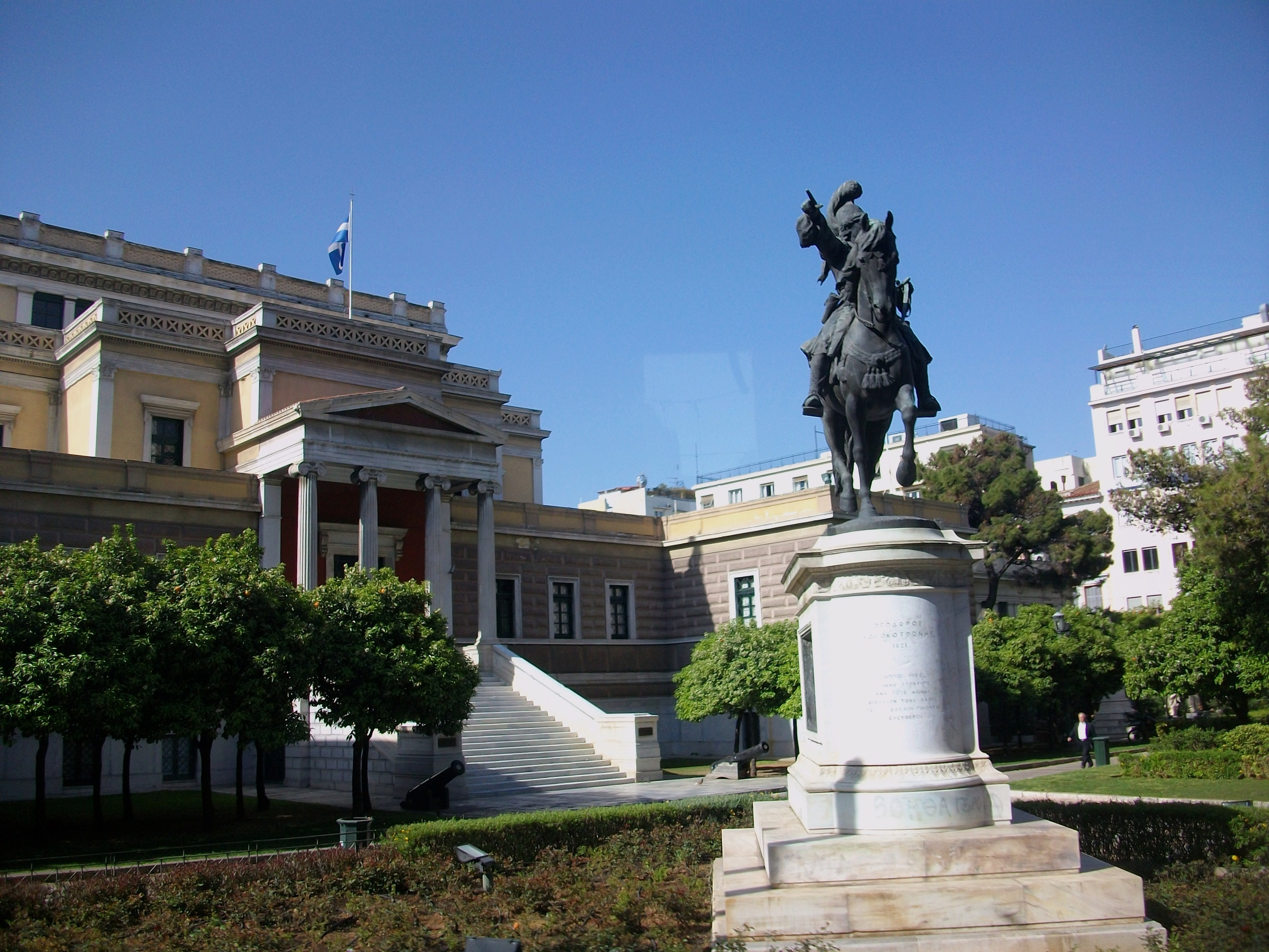 Antic Parlament Grec i estàtua eqüestre de Theodoros Kolokotronis, Atenes.